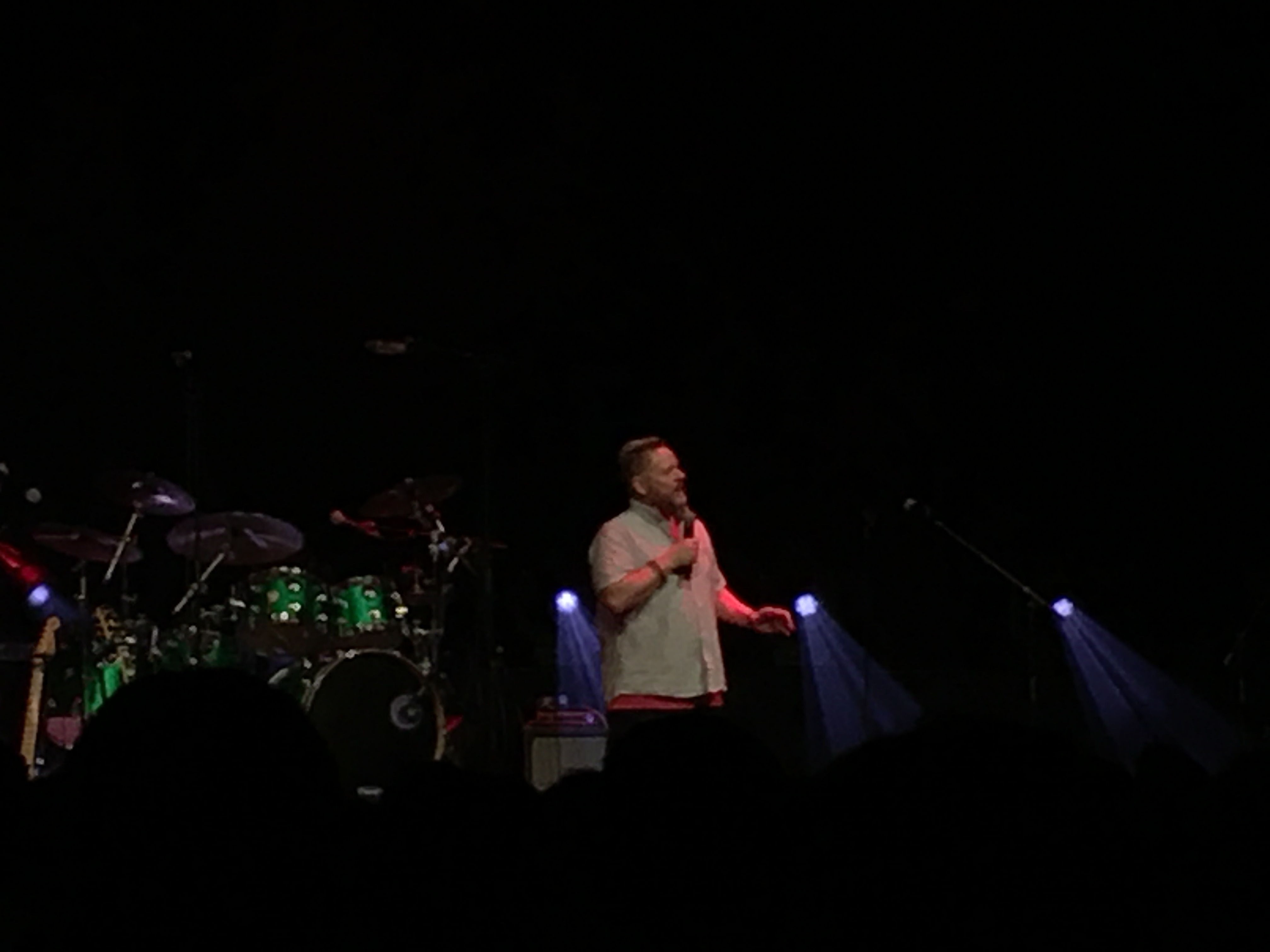 Anders Matthesen live under en juelfrokost på Tivoli Hotel & Congress Center 2019